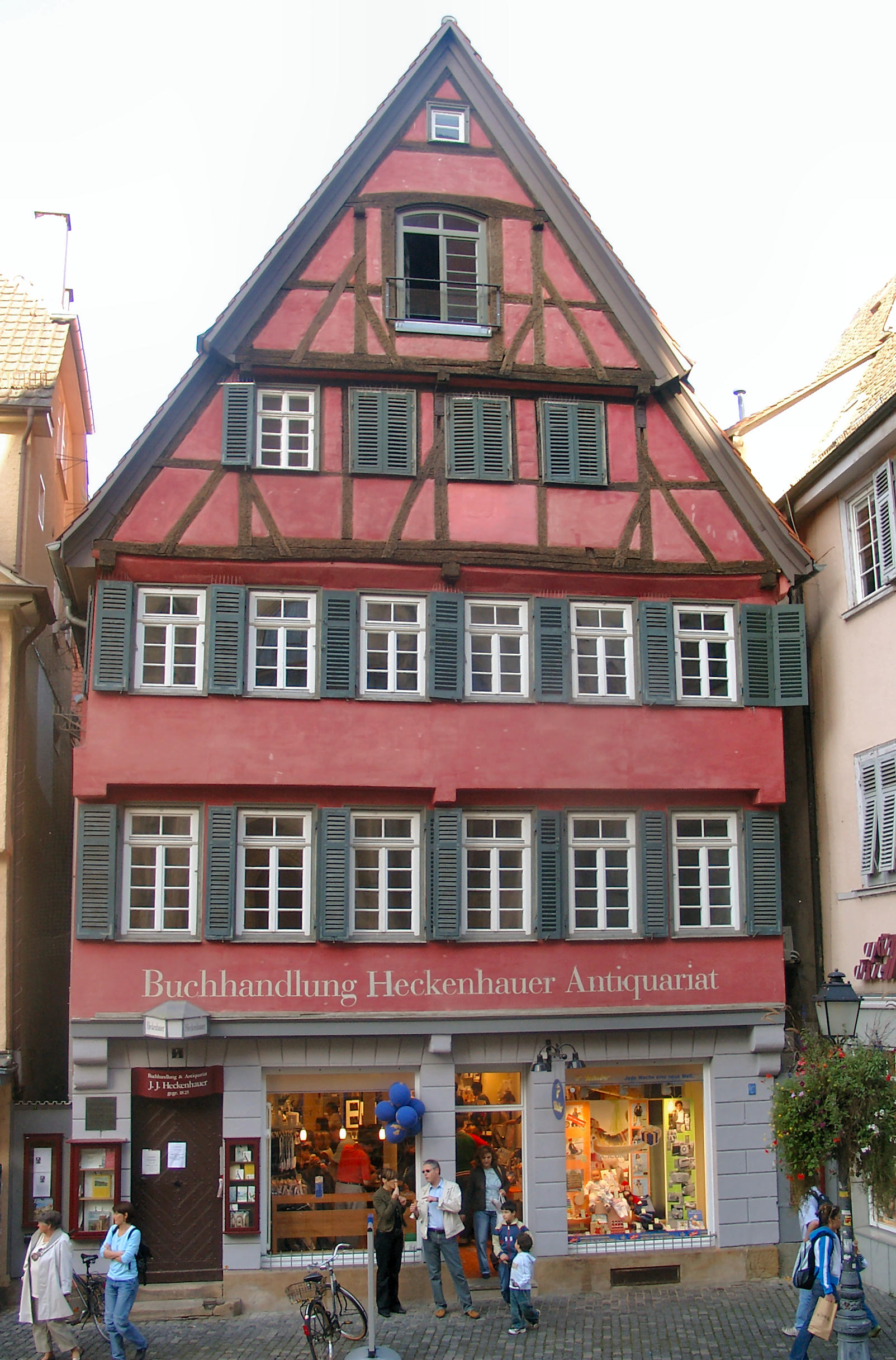 Buchhandlung und Antiquariat Heckenhauer in Tübingen - 1895-1899 Arbeitsplatz von Hermann Hesse